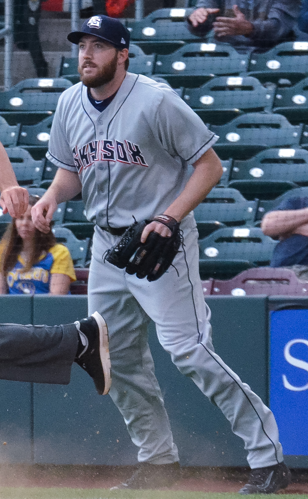 Tyler Cravy